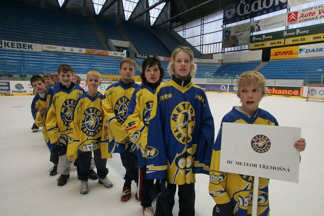 Aleš v barvách Meteoru Třemošné na plzeňském lekov cupu v roce 2007.